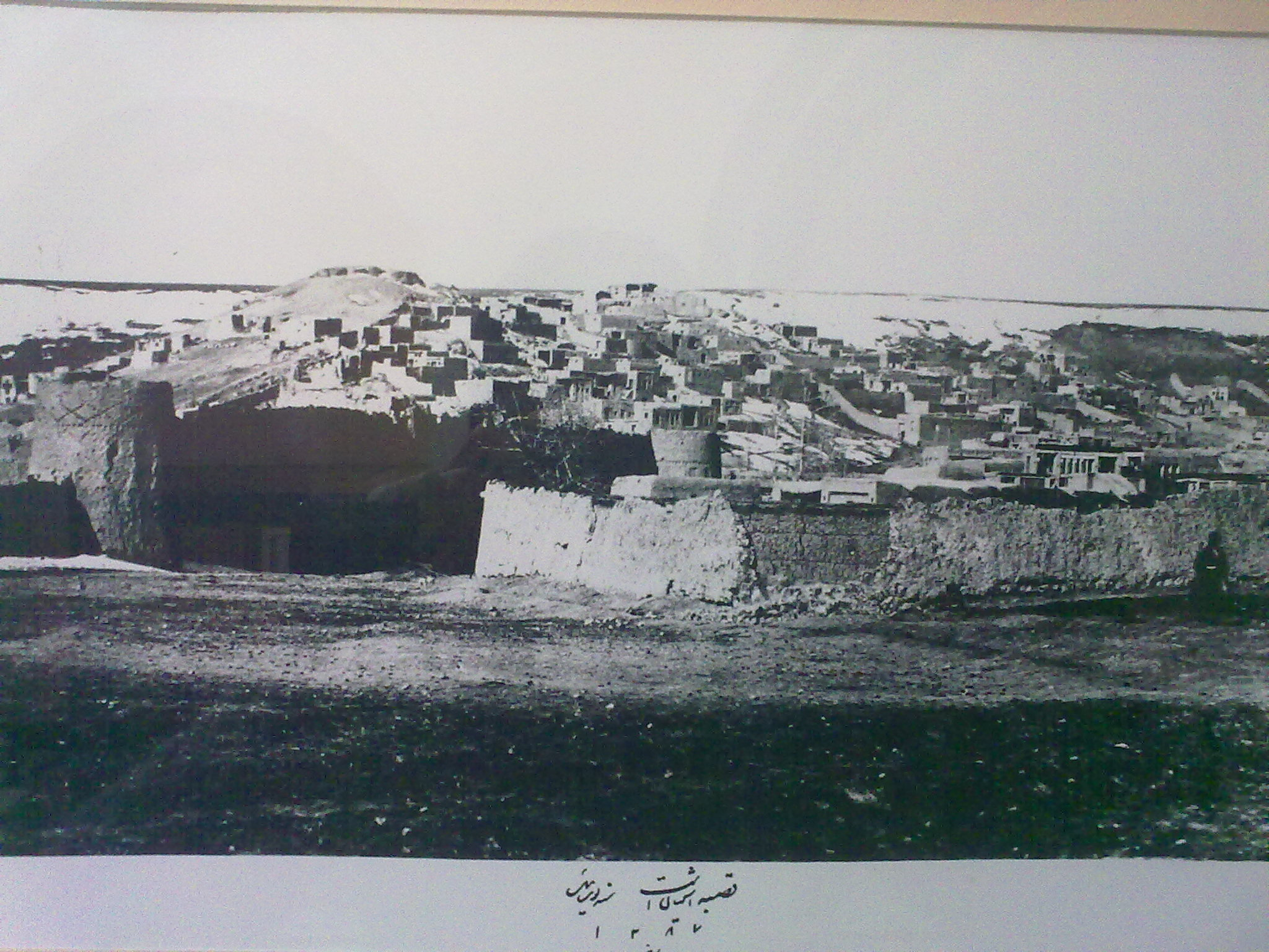 قصبه آشتیان سال 1287 هجری خورشیدی